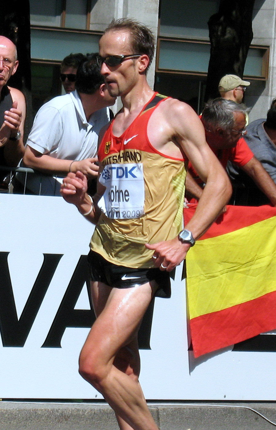 André Höhne, 15.08.2009